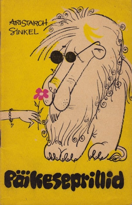 Aristarch Sinkeli följetonikogumiku "Mõõgaga mõõdetud maa" esikülg